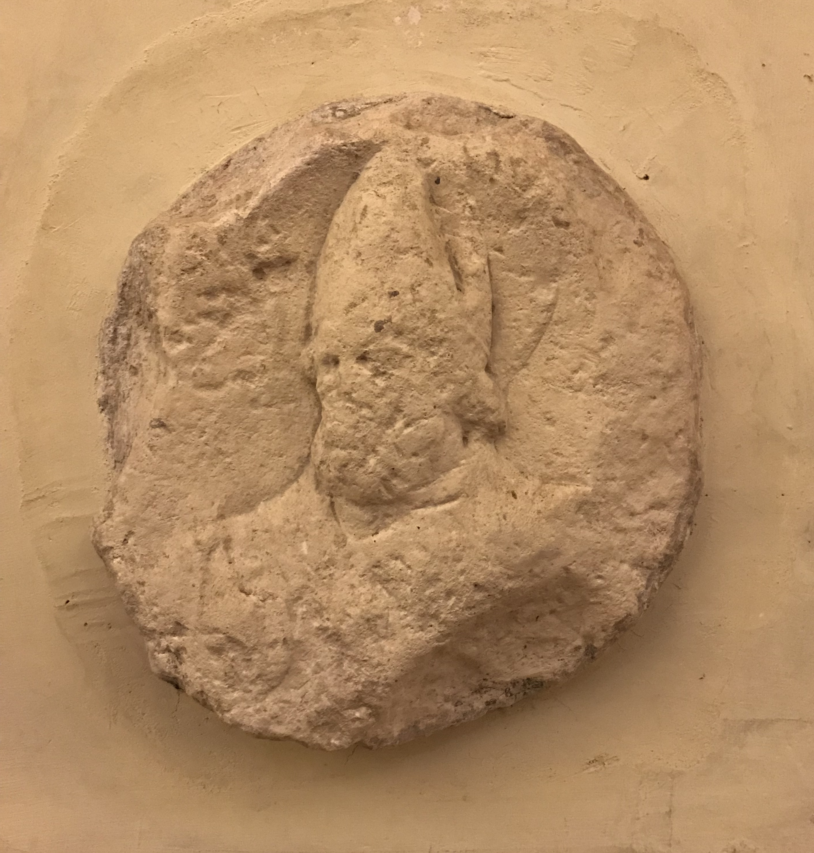 Madonna del Campo, frazione di Mortara: Santuario di Santa Maria del Campo, interno, tondo raffigurante sant'Ambrogio.